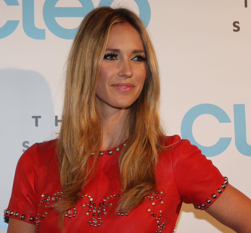 Nikki Phillips